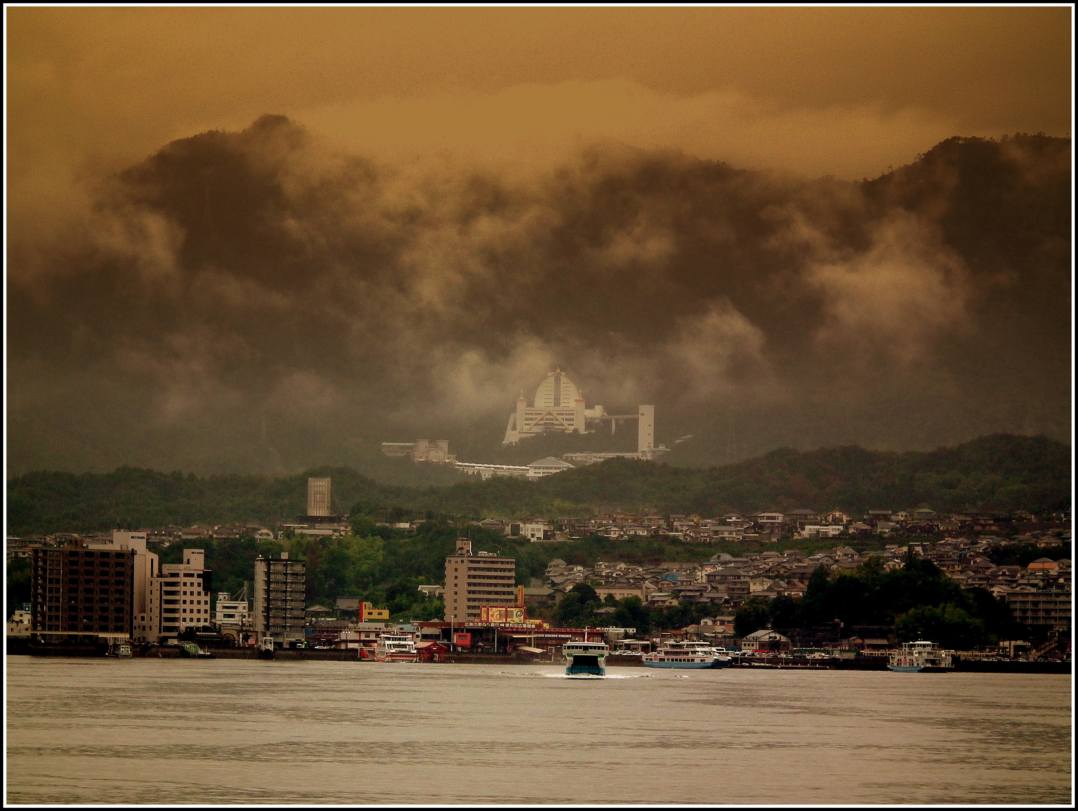 MIYAJIMA ISLAND HIROSHIMA BAY JAPAN JUNE 2012